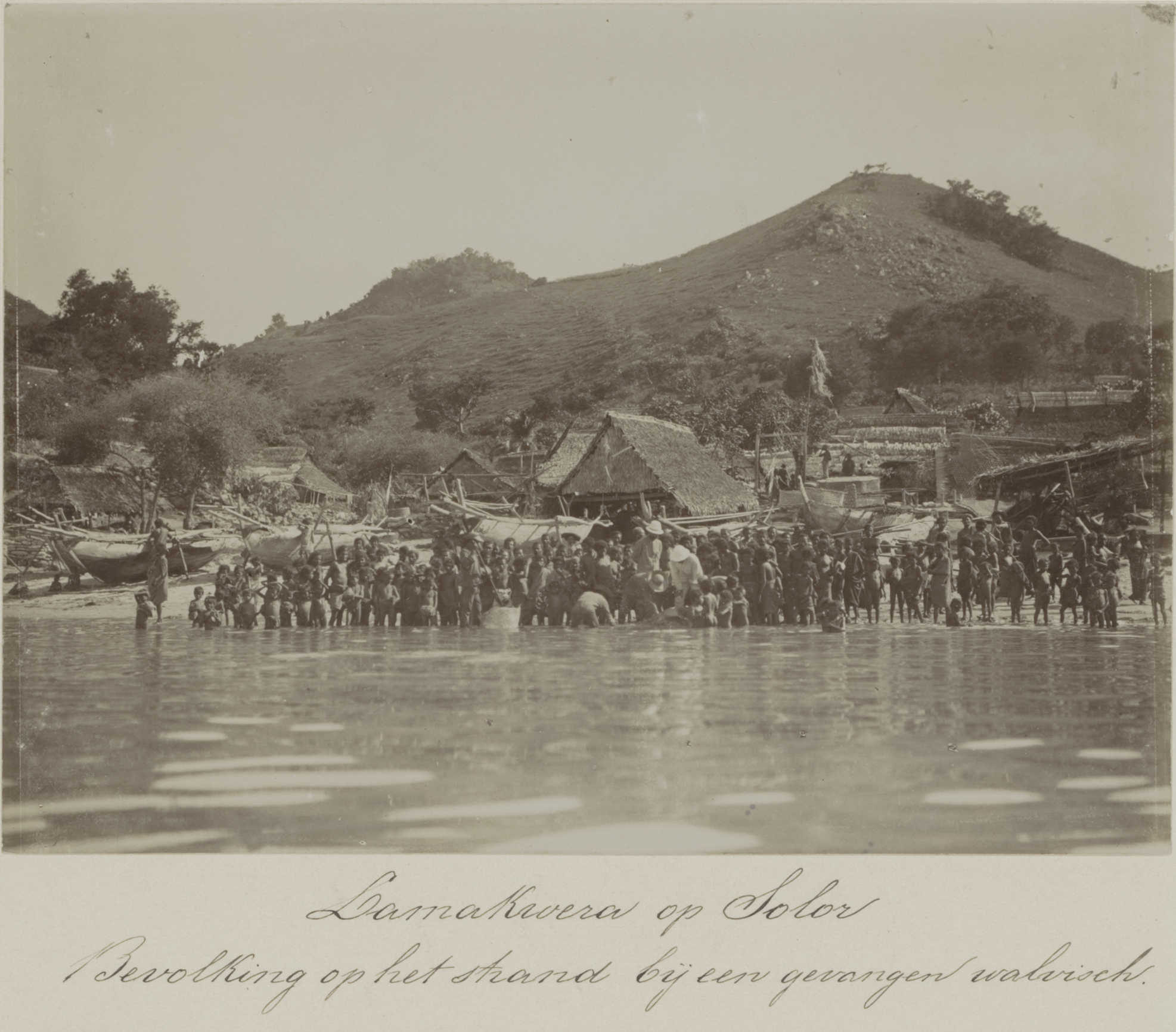 Gebeurtenis: 1899-1900, Siboga-expeditie naar Nederlands Oost-Indië, onder leiding van Max Wilhelm Carl Weber Lamakera op Solor Inlandse bevolking op het strand van de kampong bij een gevangen walvis. In het midden twee leden van de expeditie.